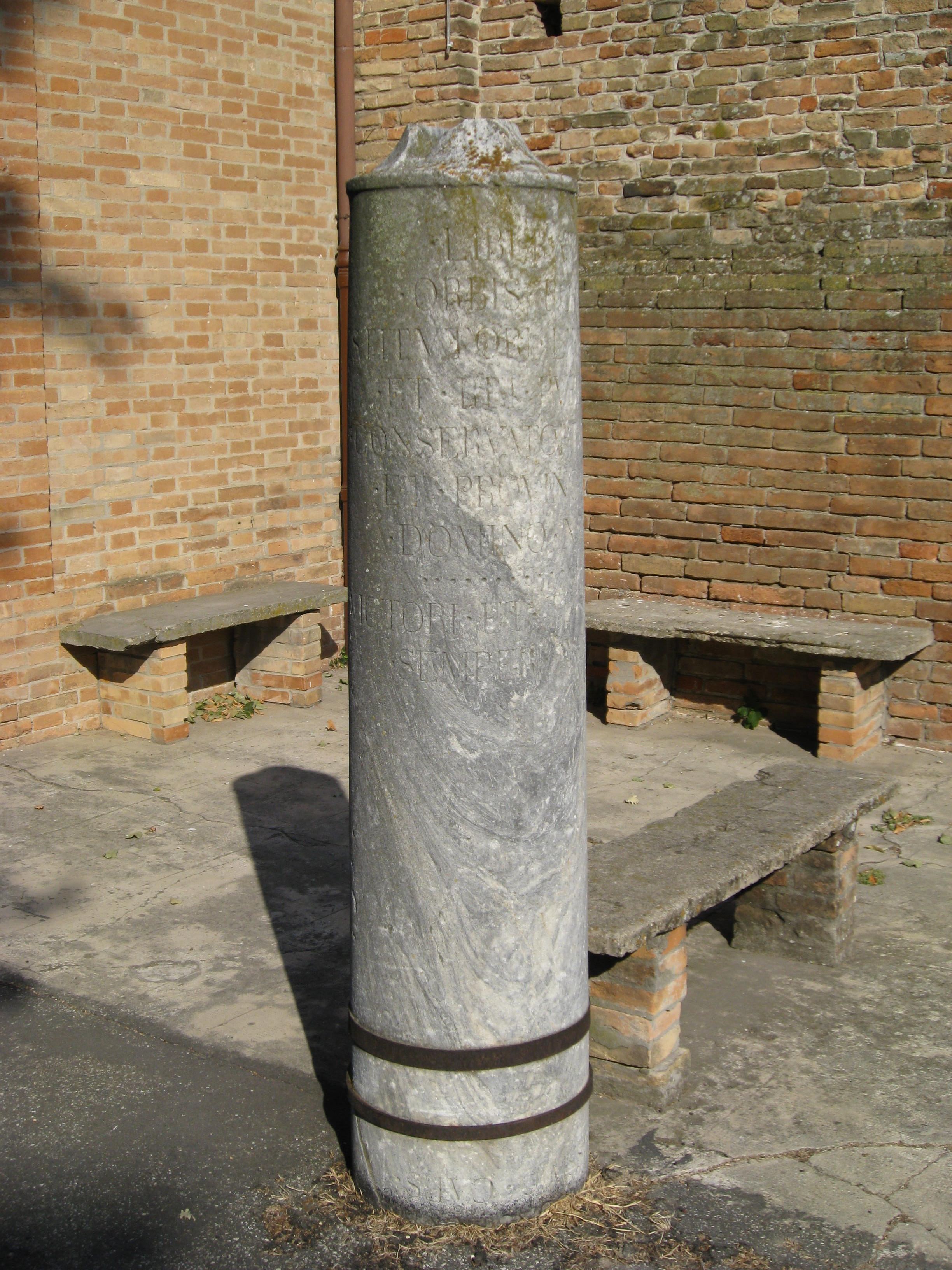 Colonna romana di Pieve di Santa Maria in Acquedotto